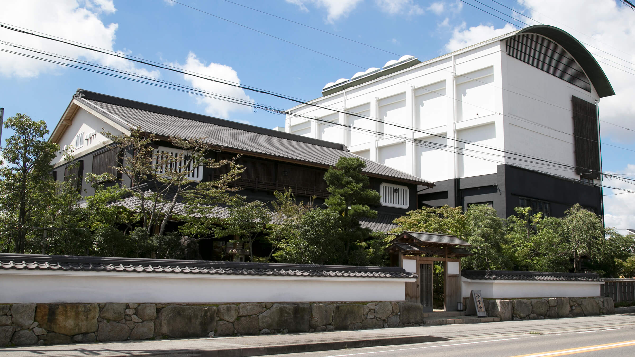 愛知県西尾市のあいや本社(あいや本店)